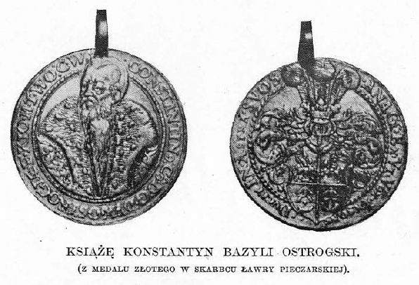 Medal Konstantego Bazylego Ostrogskiego.